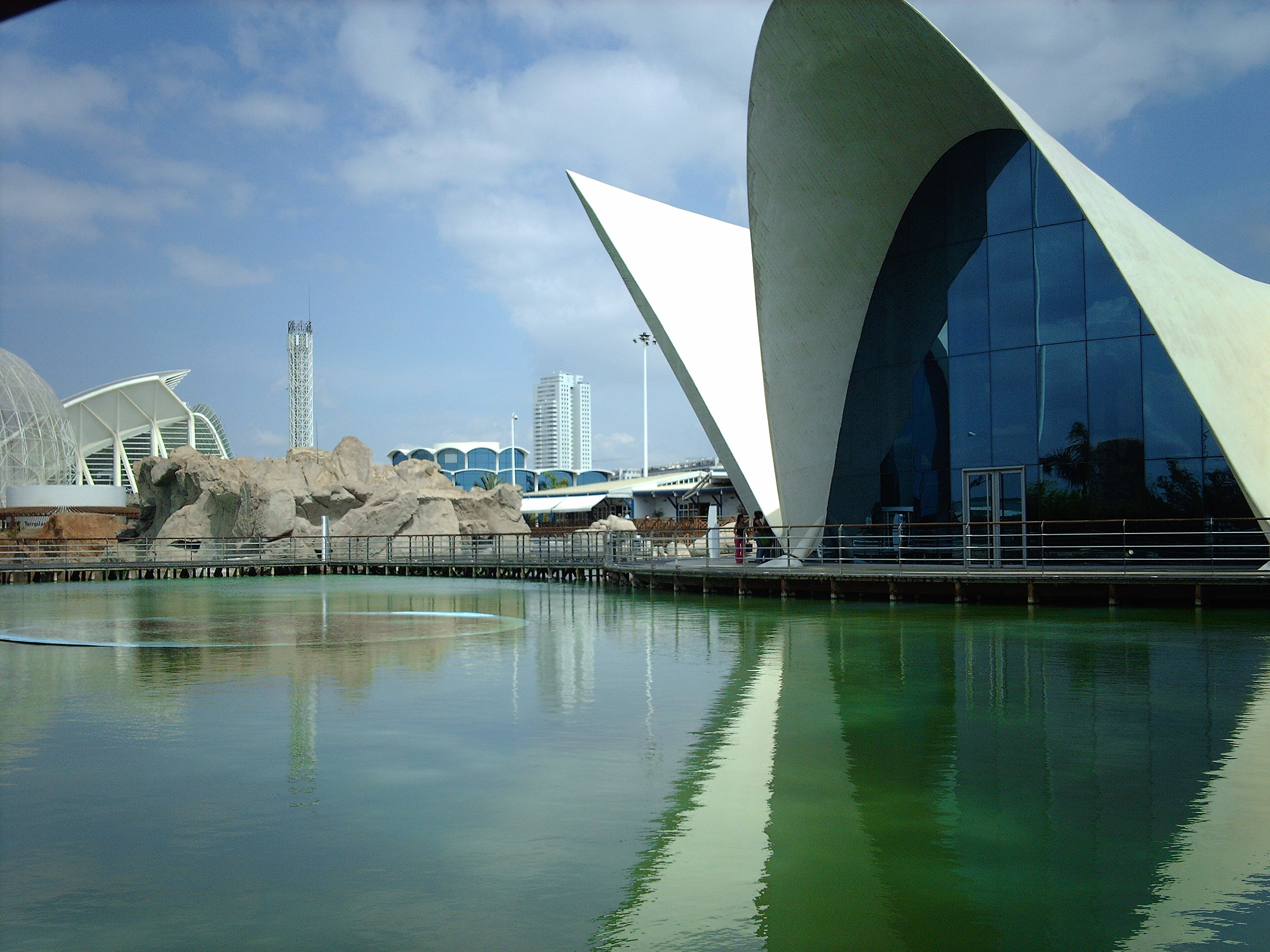 Oceanográfico de Valencia. Ciudad de las Artes y las Ciencias.